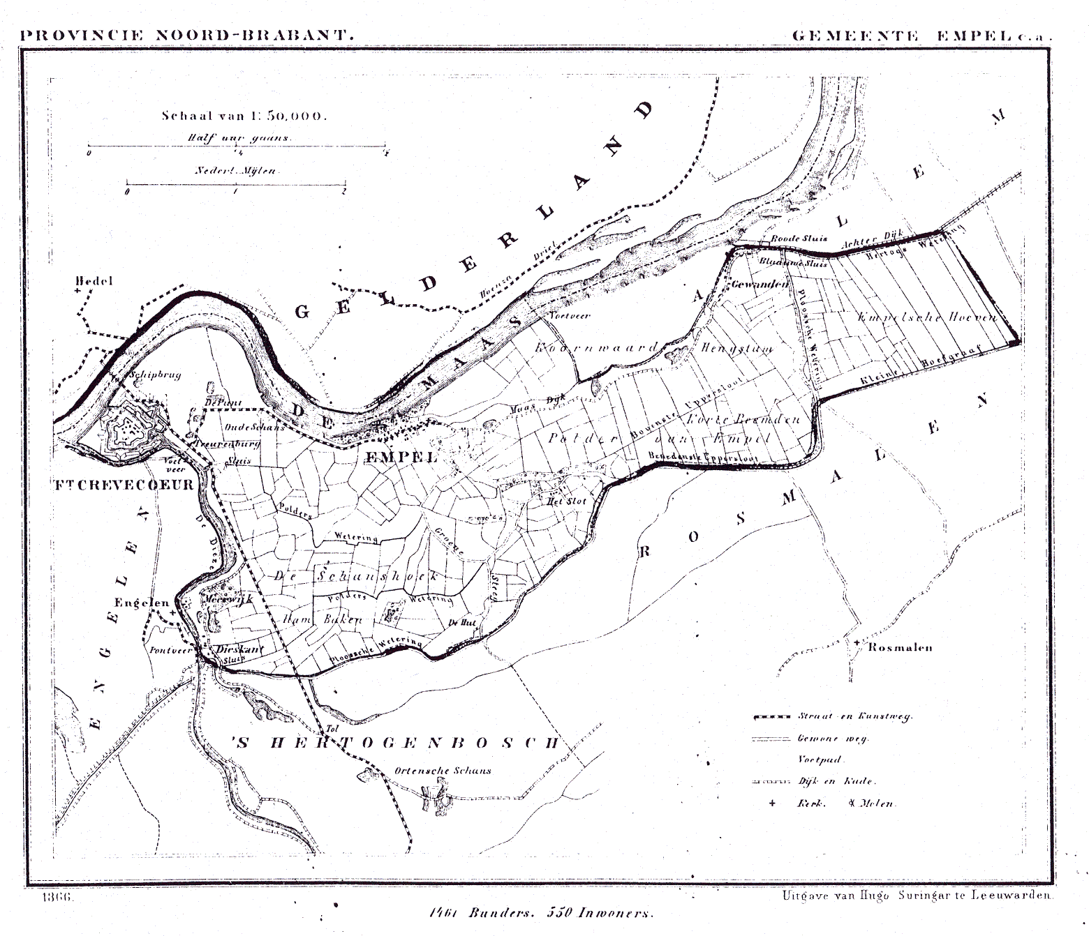 Nederland, Noord-Brabant, Gemeente Empel